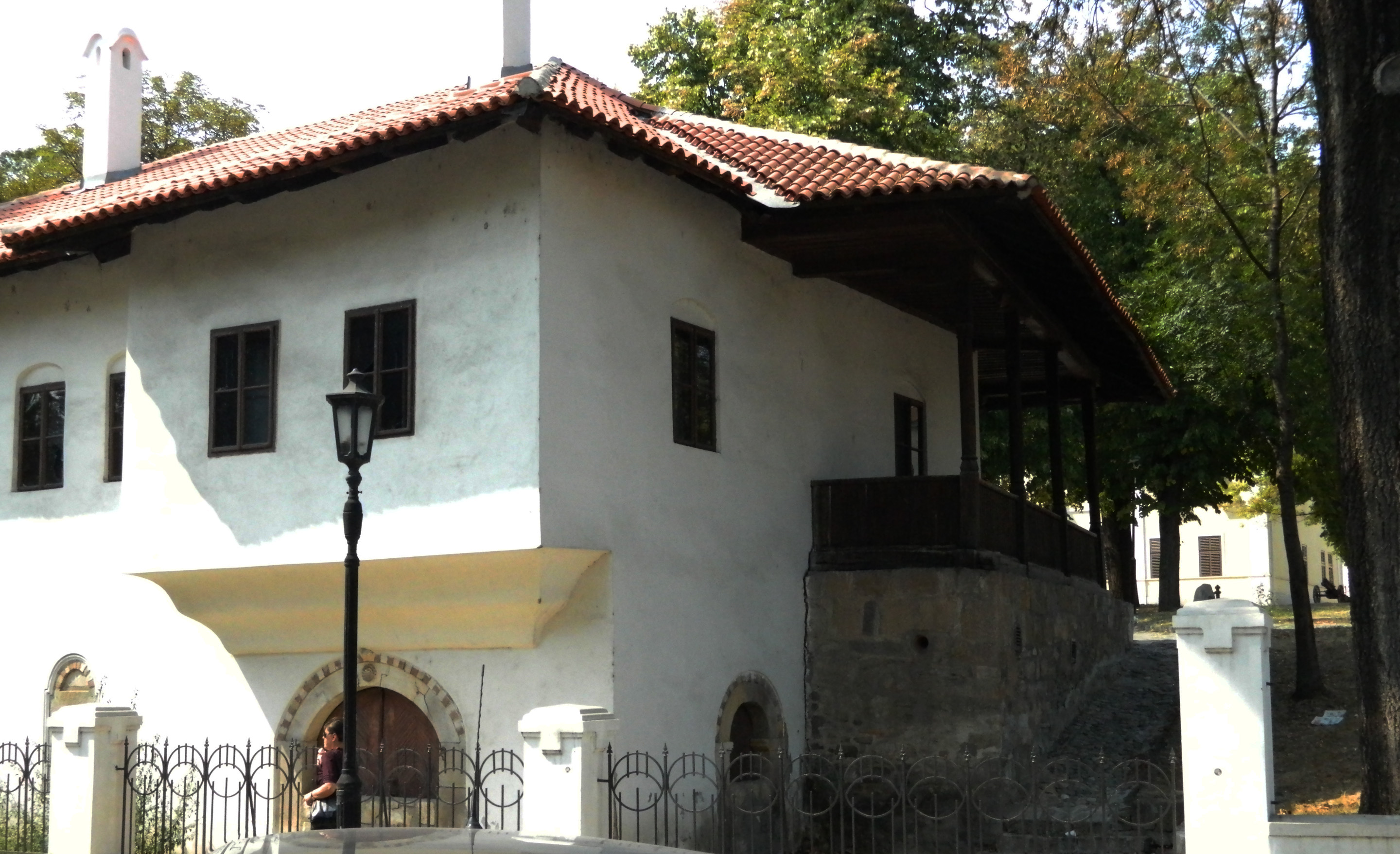 Mesto službovanja Sime MIlosavljevića Paštrmca, zvanog Amidža, savetnika kneza MIloša Obrenovića